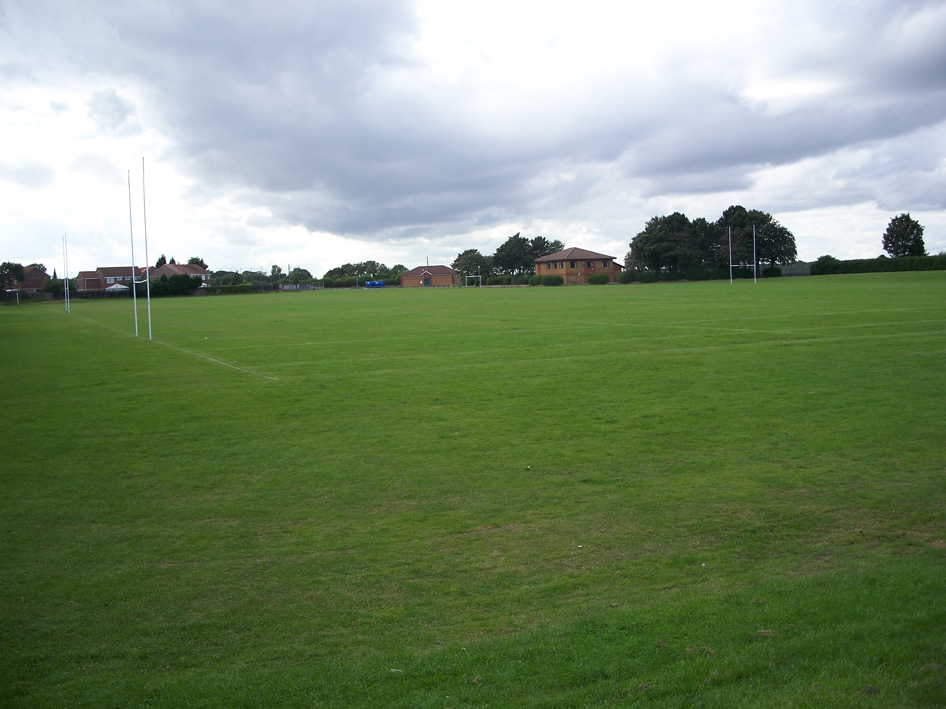 Seghill Welfare Field